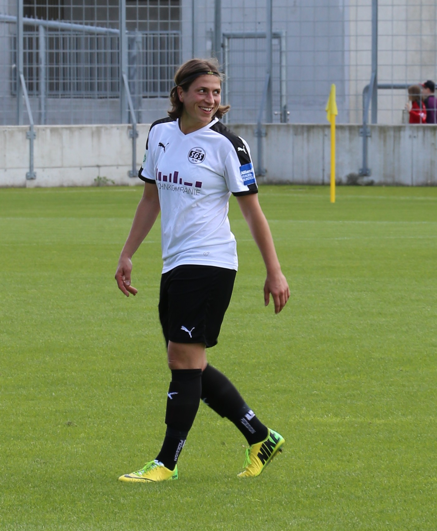 Charline Hartmann (SGS Essen) beim Frauen-Bundesliga-Spiel FC Bayern München gegen SGS Essen am 21. Mai 2017 im Stadion an der Grünwalder Straße (Ergebnis war 2:0)